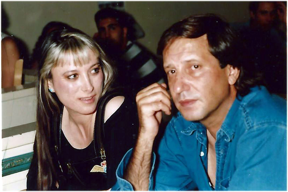 מיקה ויגאל בשן